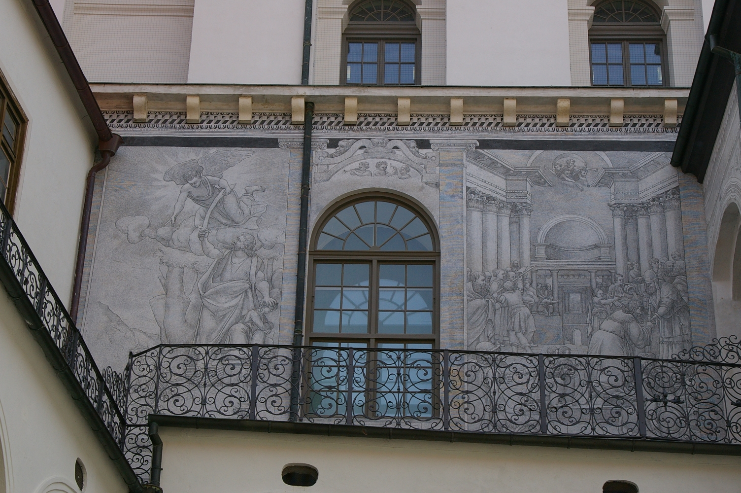 Stadtschloss in Neuburg an der Donau, Innenhof mit Sgraffitis.